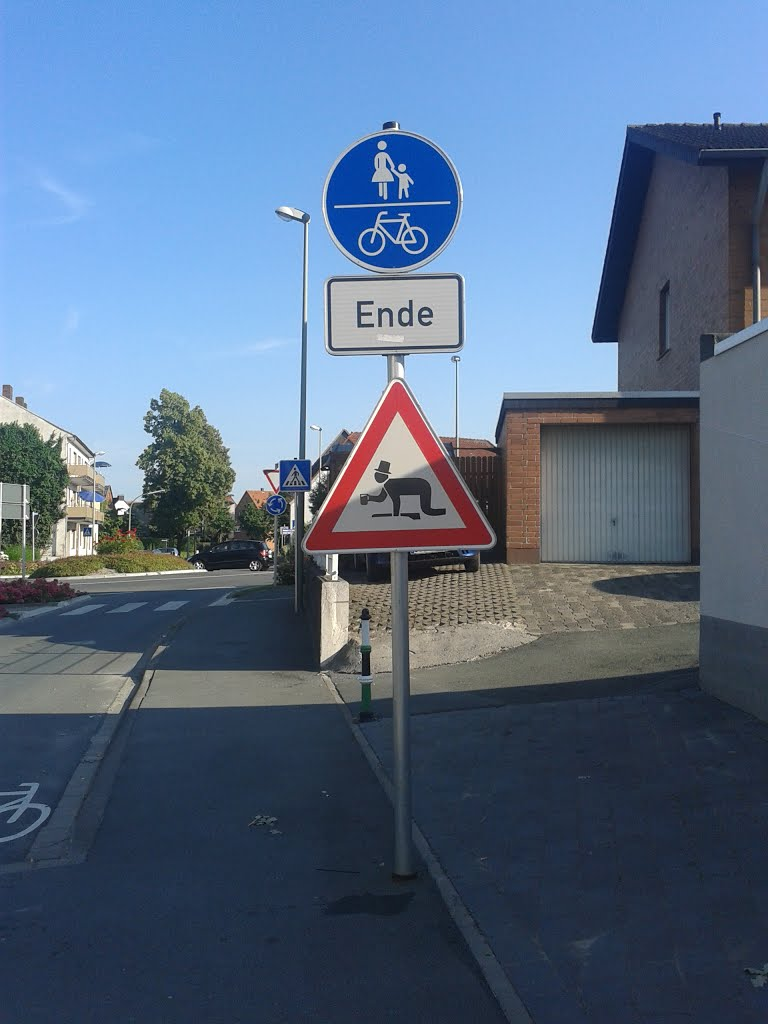 Attention - "Schützenfest